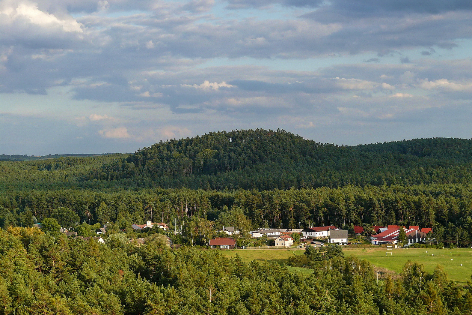 Obec Srbsko a vrch Chrby ze Sokolky